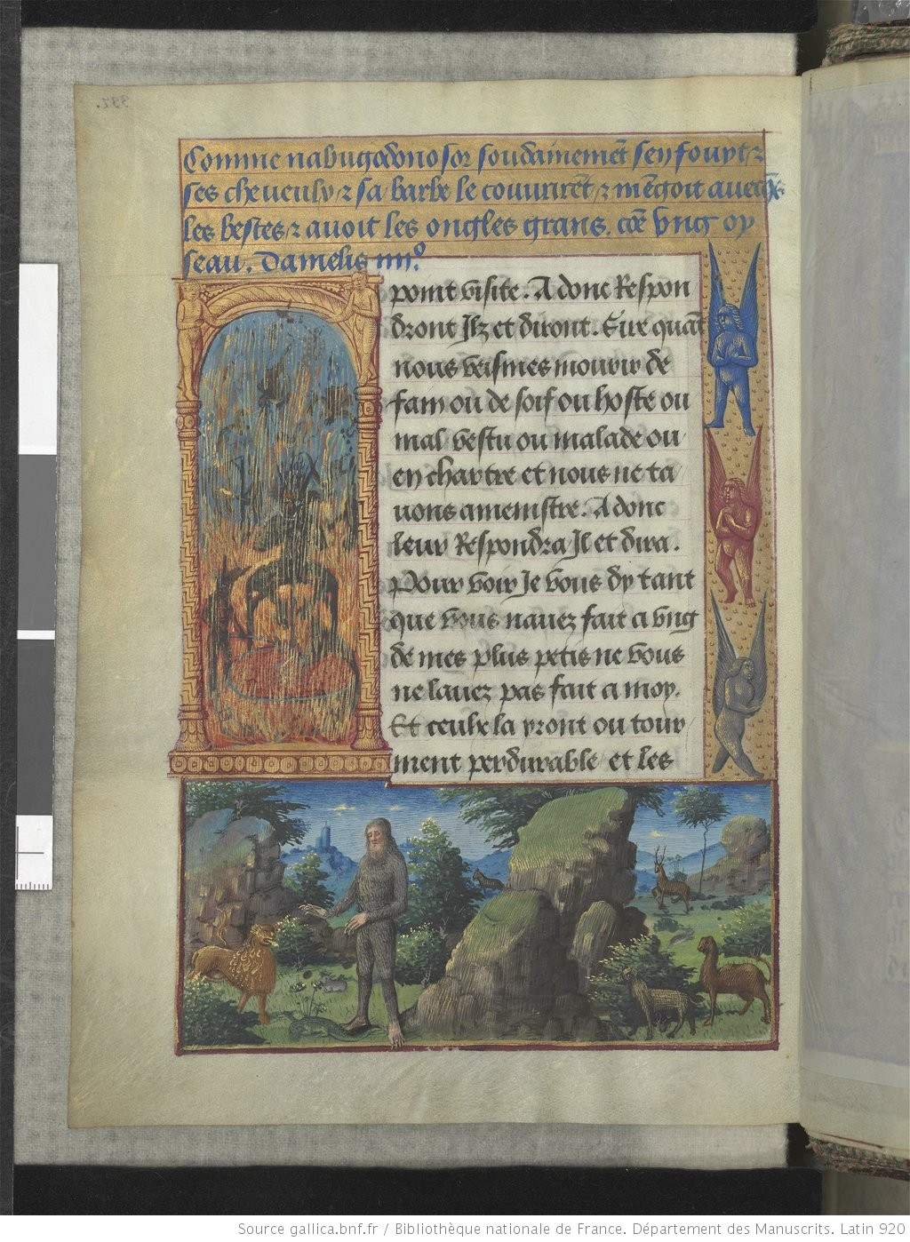 Page de manuscrit enluminé dont le bas de page représente Nabuchodonosor ensauvagé